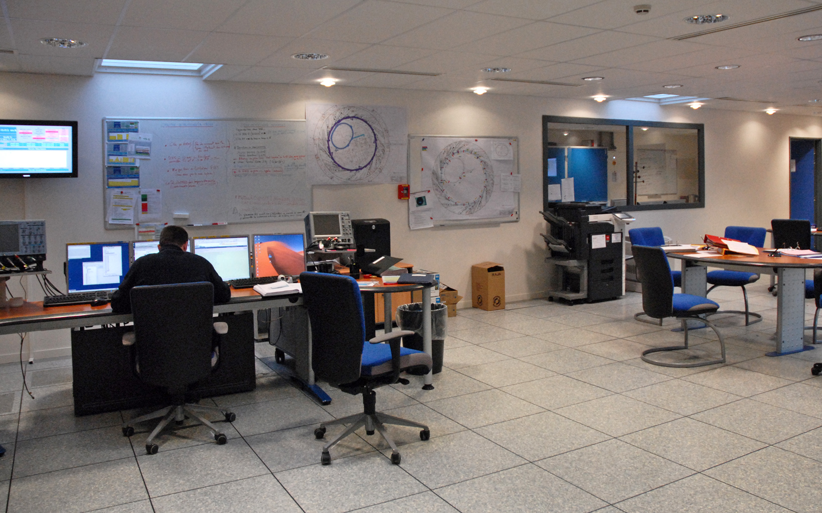 SOLEIL est une source de lumière dotée de propriétés exceptionnelles et nécessaires pour les communautés scientifiques et industrielles (grande brillance : 10000 fois plus intense que la lumière solaire), grande gamme spectrale source « blanche » allant des infrarouges (1eV) aux rayons X durs (50 keV)), polarisation (linéaire, circulaire etc.), source pulsée). Il ouvre ainsi de nouvelles perspectives pour sonder la matière avec une résolution de l’ordre du millionième de mètres et une sensibilité à tous les types de matériaux.